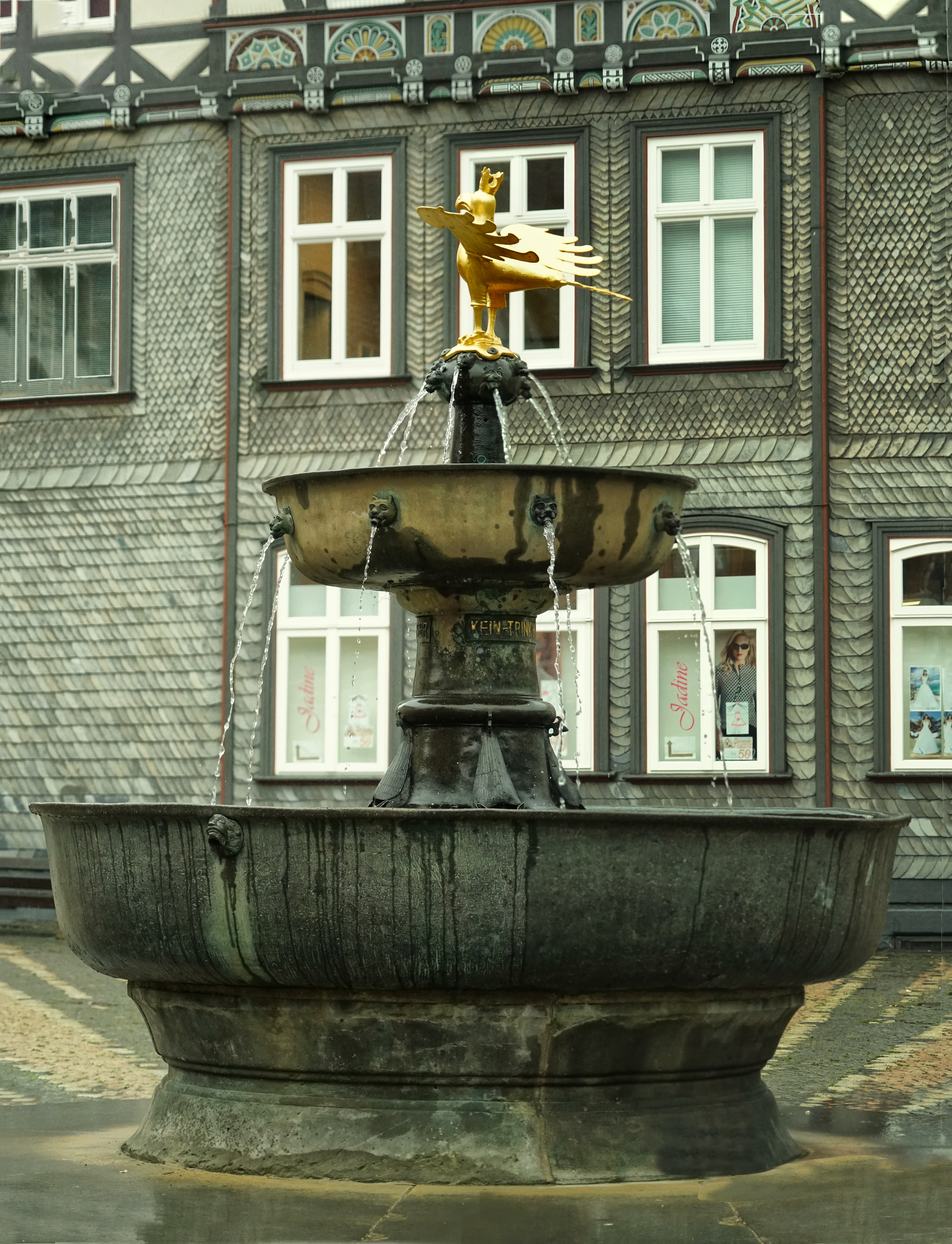 Der Marktbrunnen von Goslar steht auf dem Marktplatz. Er besteht aus 2 Schalen, die untere Brunnenschale stammt aus dem 12. Jh und ist der größte Bronzeguss aus romanischer Zeit, die obere Schale ist ca. 100 Jahre jünger. Der Brunnen wird von der Kopie eines goldenen Adlers gekrönt (Orginal im Goslaer Museum), der aus dem 13.Jh stammt, die Krone wahrscheinlich aus dem 18.Jh.